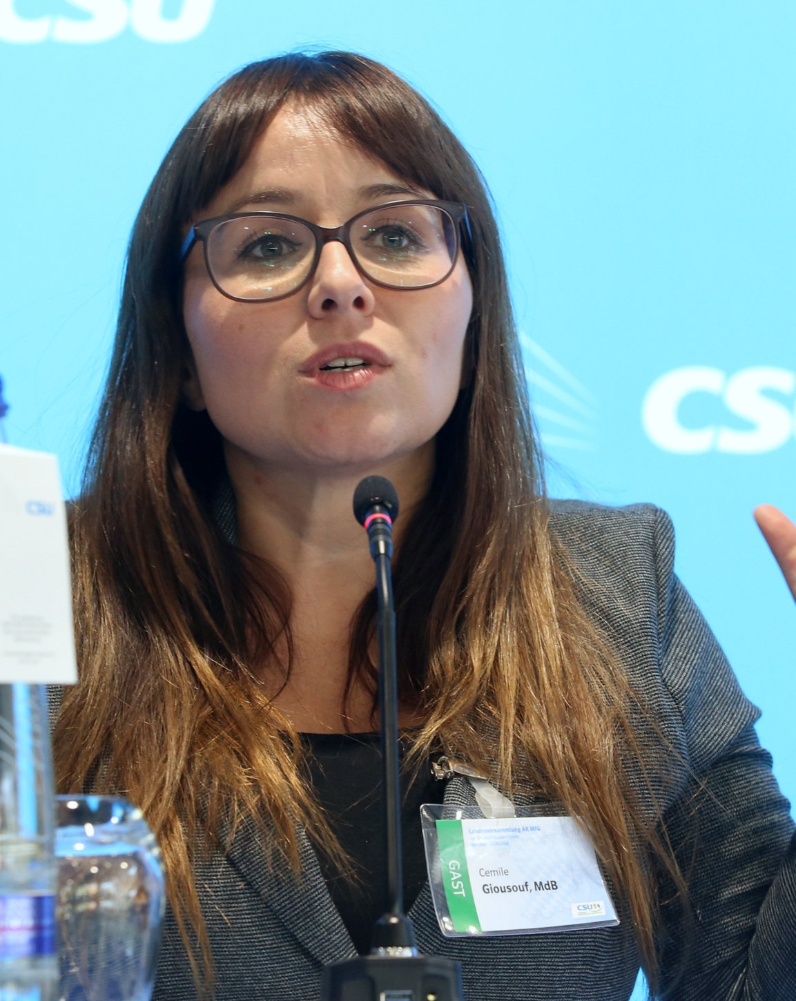 Cemile Giousouf, deutsch-griechische Politikerin (CDU) türkischer Herkunft. Hier während der ersten Landesversammlung des CSU-Arbeitskreises Integration und Migration (AK MIG) in der CSU-Landesleitung in München am 22. Oktober 2016. Titel des Werks: "Cemile Giousouf am 22.10.2016 in München (Bild-Nr. 1133)".